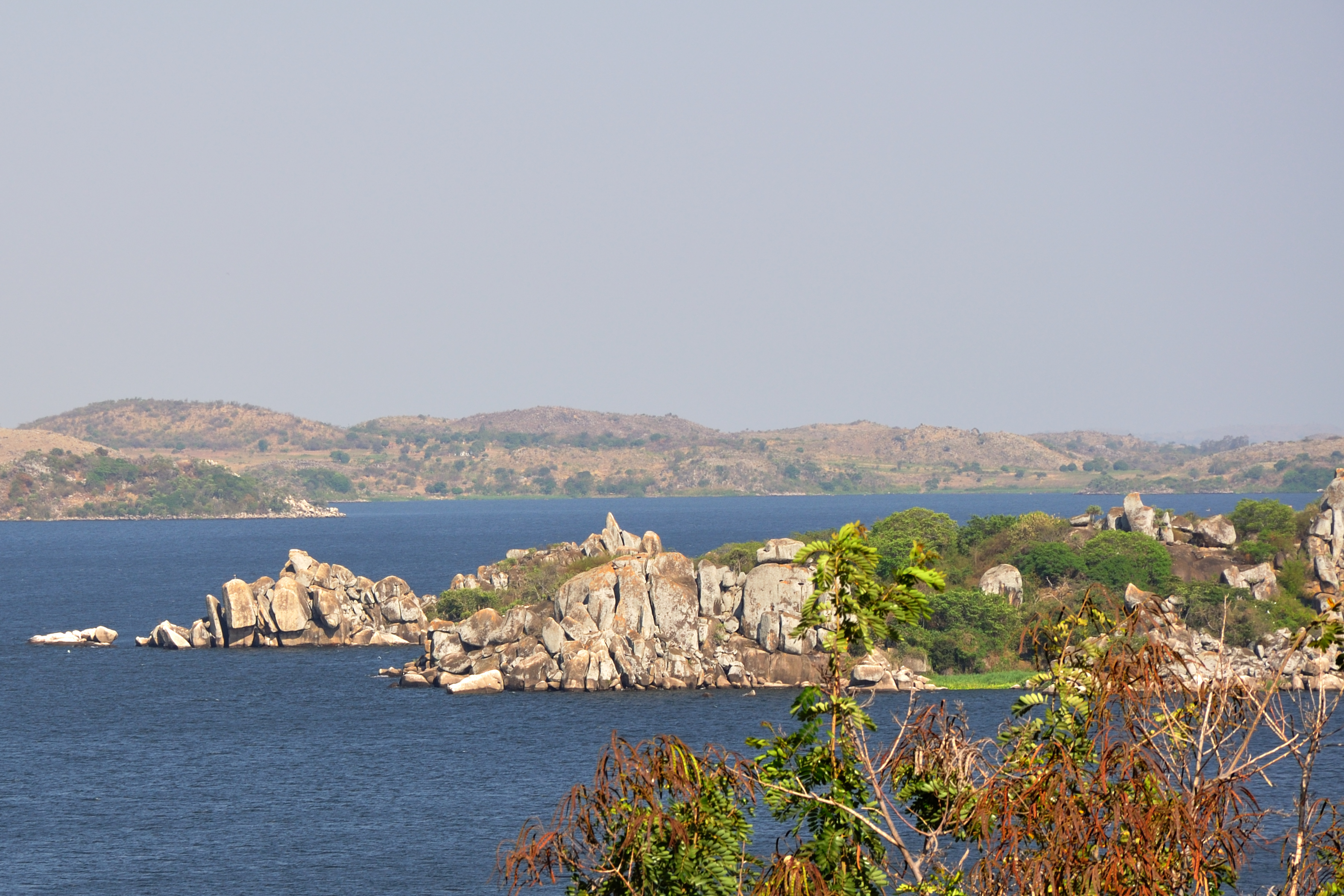 Tanzania, views in Mwanza